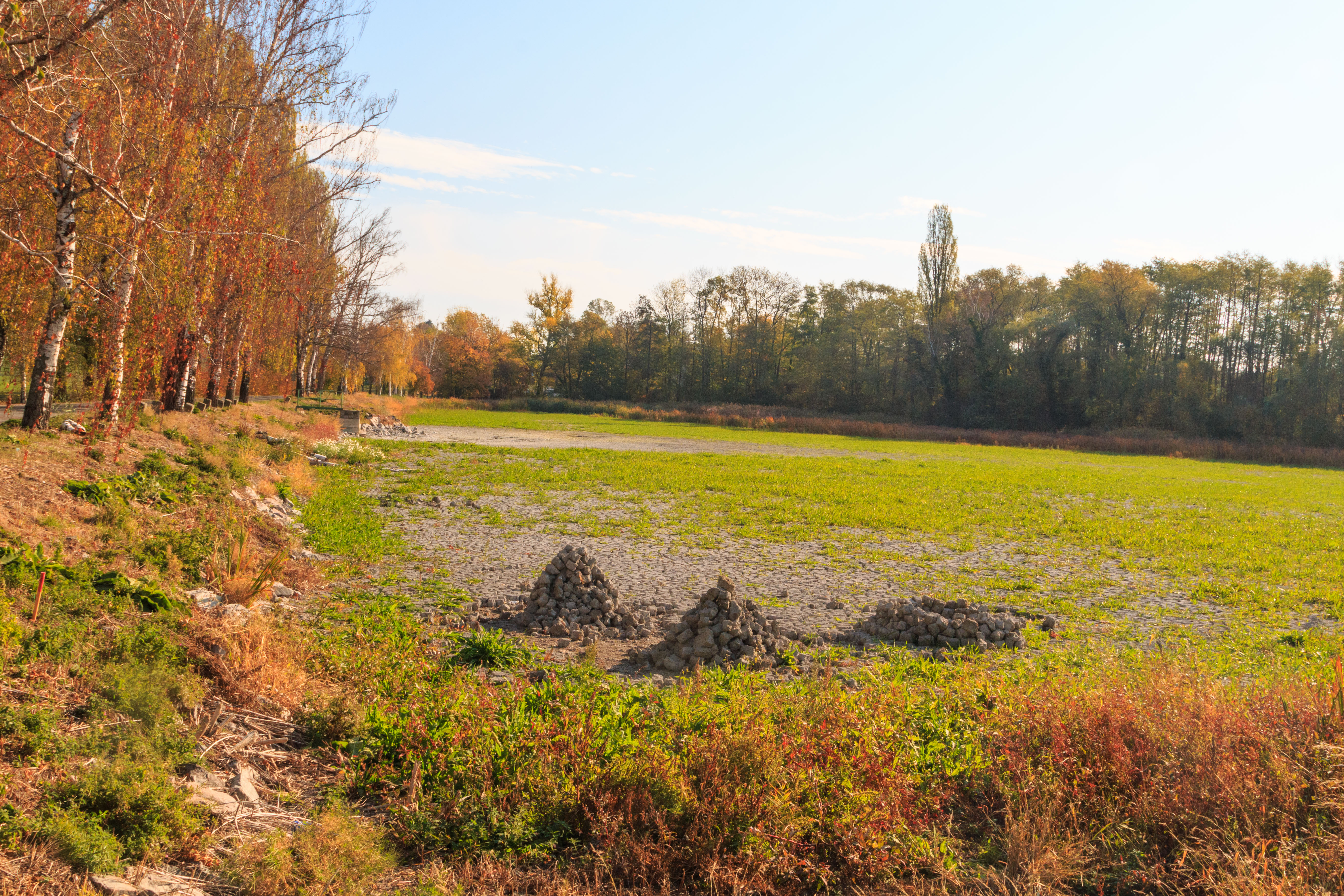 rybník Ježděnec u Honbic Project: Vodstvo. Ticket: 1617.